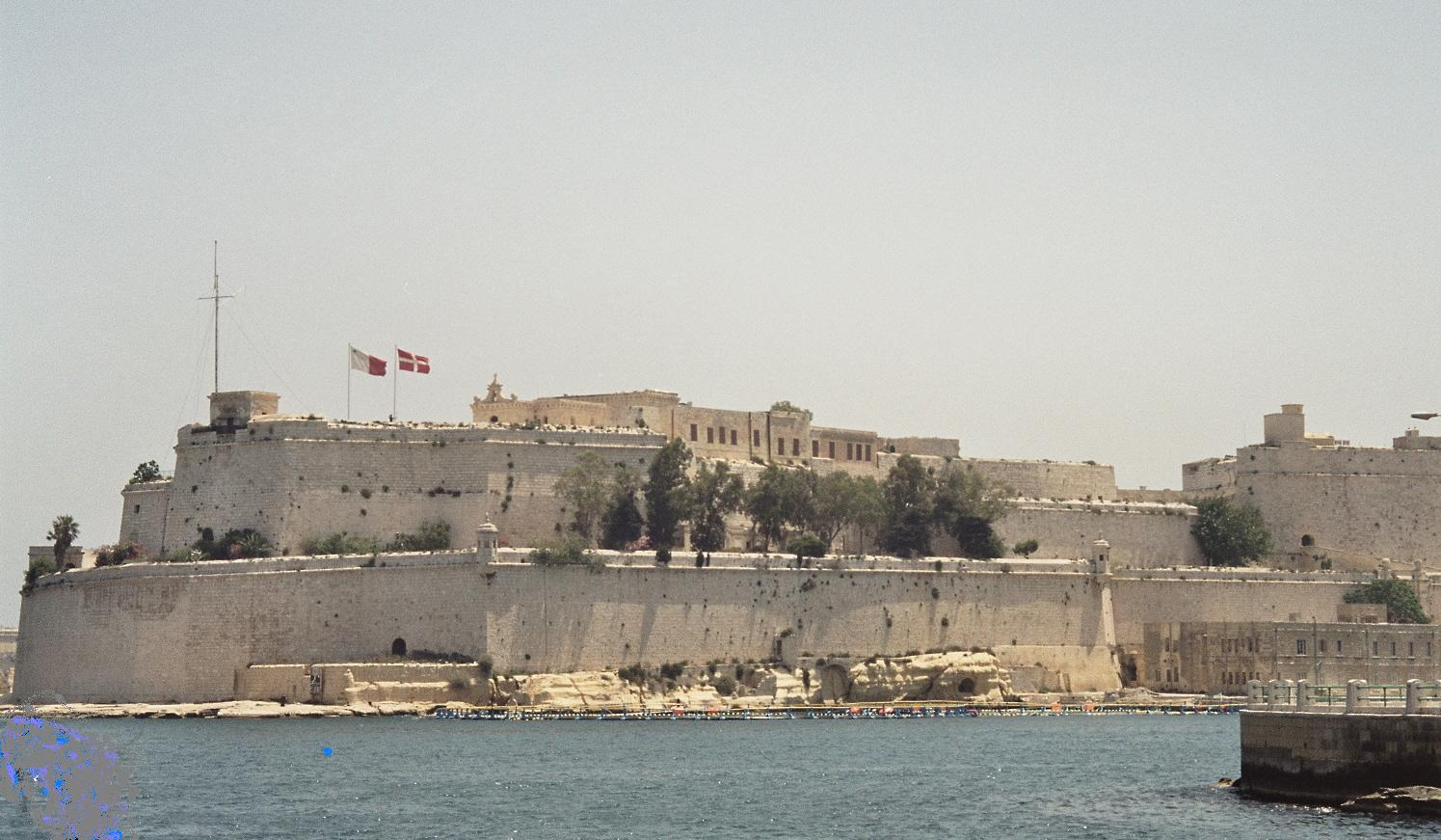 Fort St. Angelo (Malta)